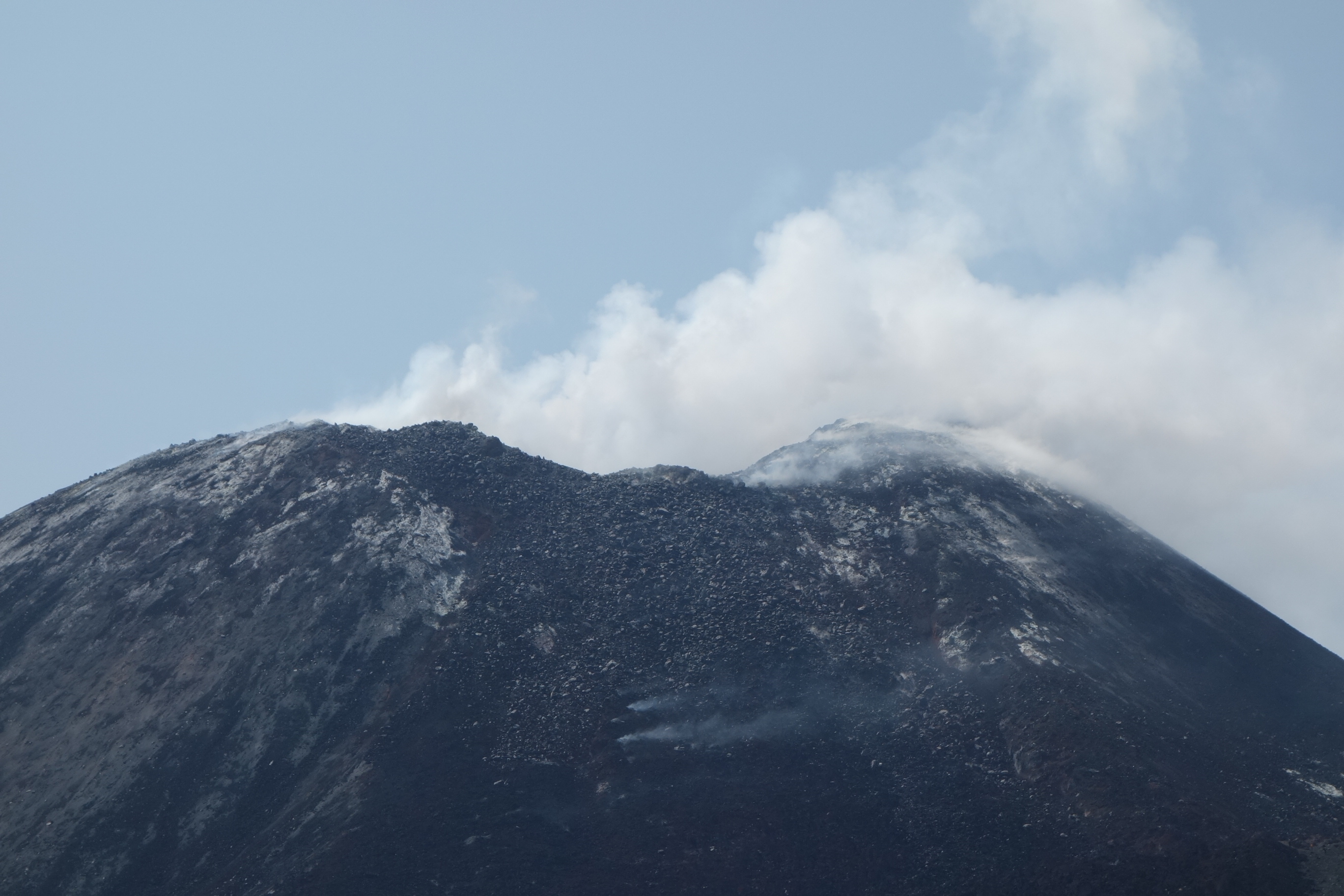 Crater of Anak Krakatau Volcano